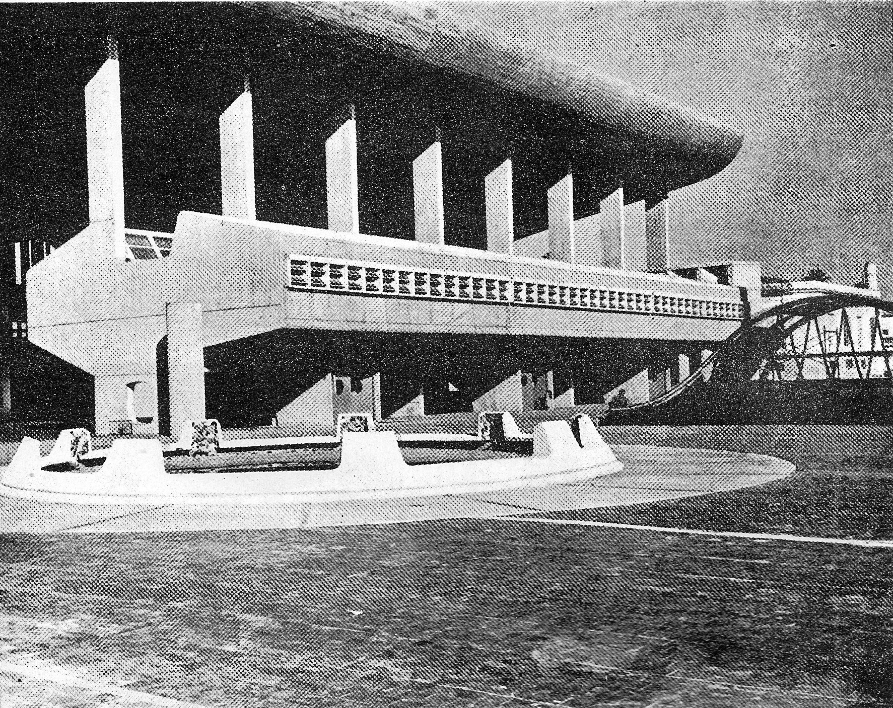 Escuela Superior de Comercio “Manuel Belgrano”, inaugurada en Córdoba (Argentina) en 1971. Vista de la terraza patio y los gabinetes de ciencias.